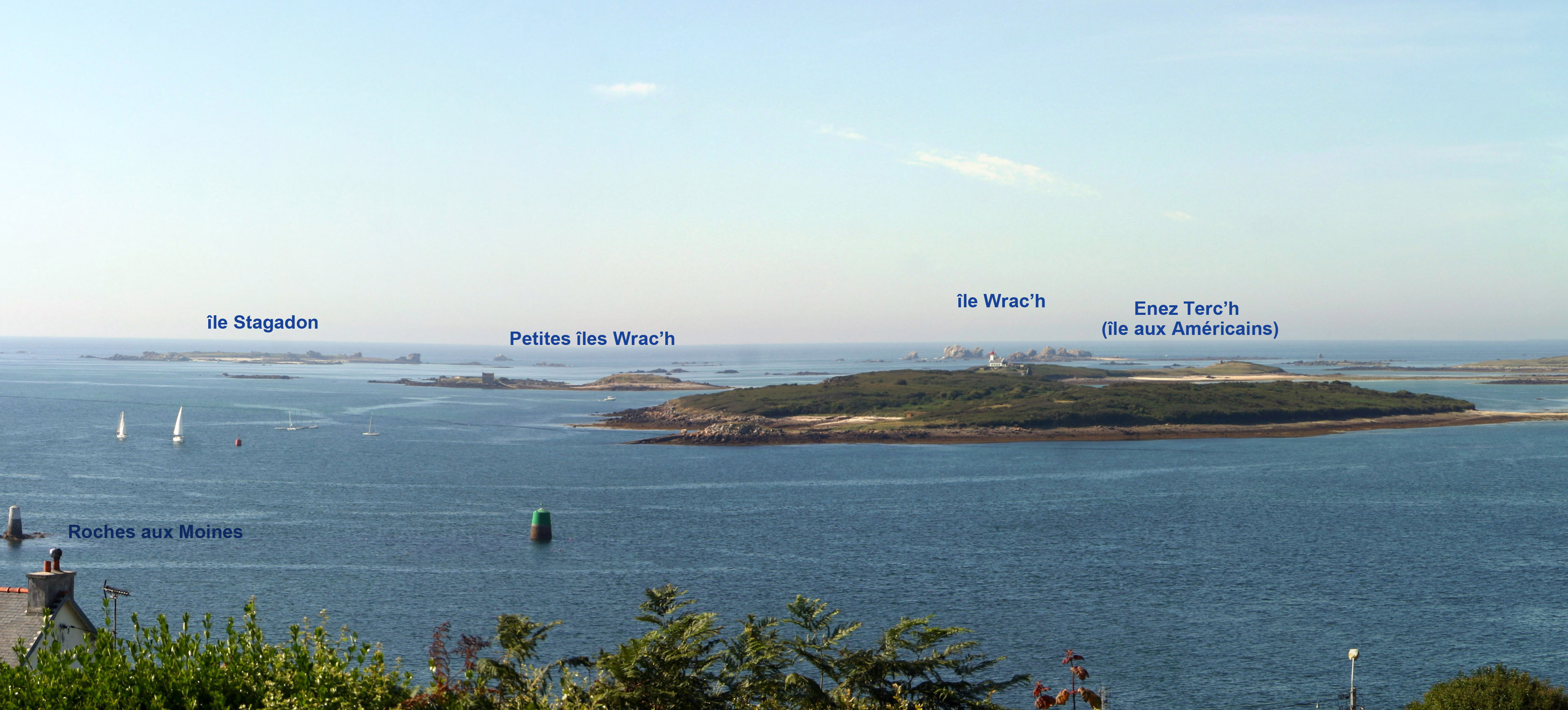 Îles au large de l'Aber Wrac'h-Landéda-Finistère-Bretagne-France